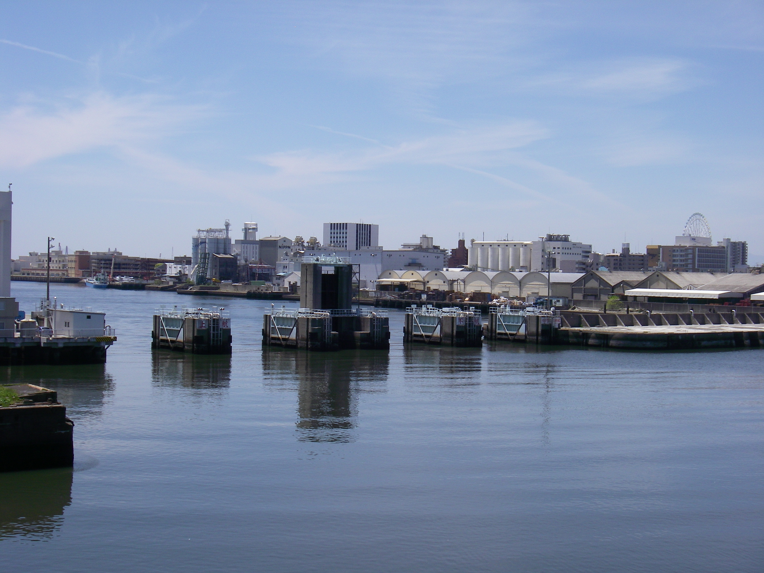 堀川口防潮水門（愛知県名古屋市港区）